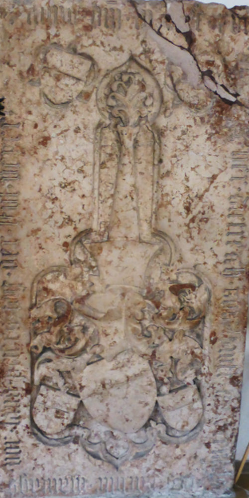 Grabplatte des Dietrich von Stauff zu Ehrenfels († 1417) in der kath. Pfarrkirche St. Peter und Paul in Beratzhausen